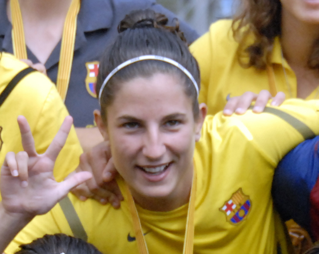 Final Copa Catalunya Femenina